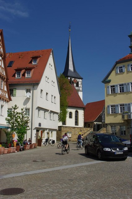 Kirchheim am Neckar - Ortsmitte